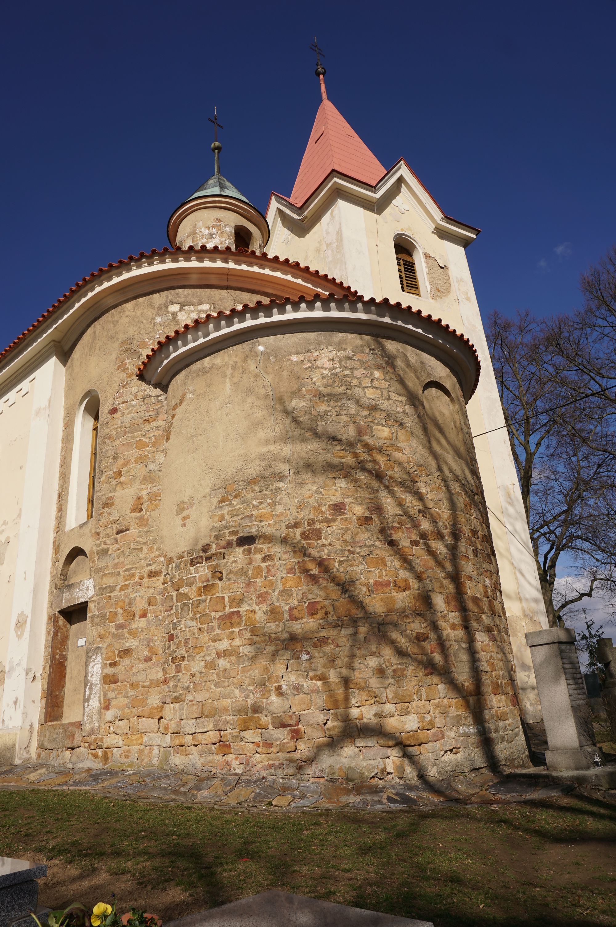 Kostel svatého Martina, náves, Kostelec u Křížků.